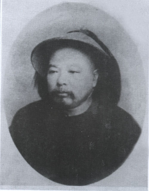 袁昶（1846年－1900年7月29日），原名振蟾，字爽秋，号重黎，浙江桐庐人。清朝官员，官至太常寺卿。庚子事变时因主和直谏与许景澄、徐用仪等人一同被处死，后被平反并追谥为忠节公。袁昶也是同光体浙派诗人的代表。（Yuan Chang, politician of the Qing Dynasty.